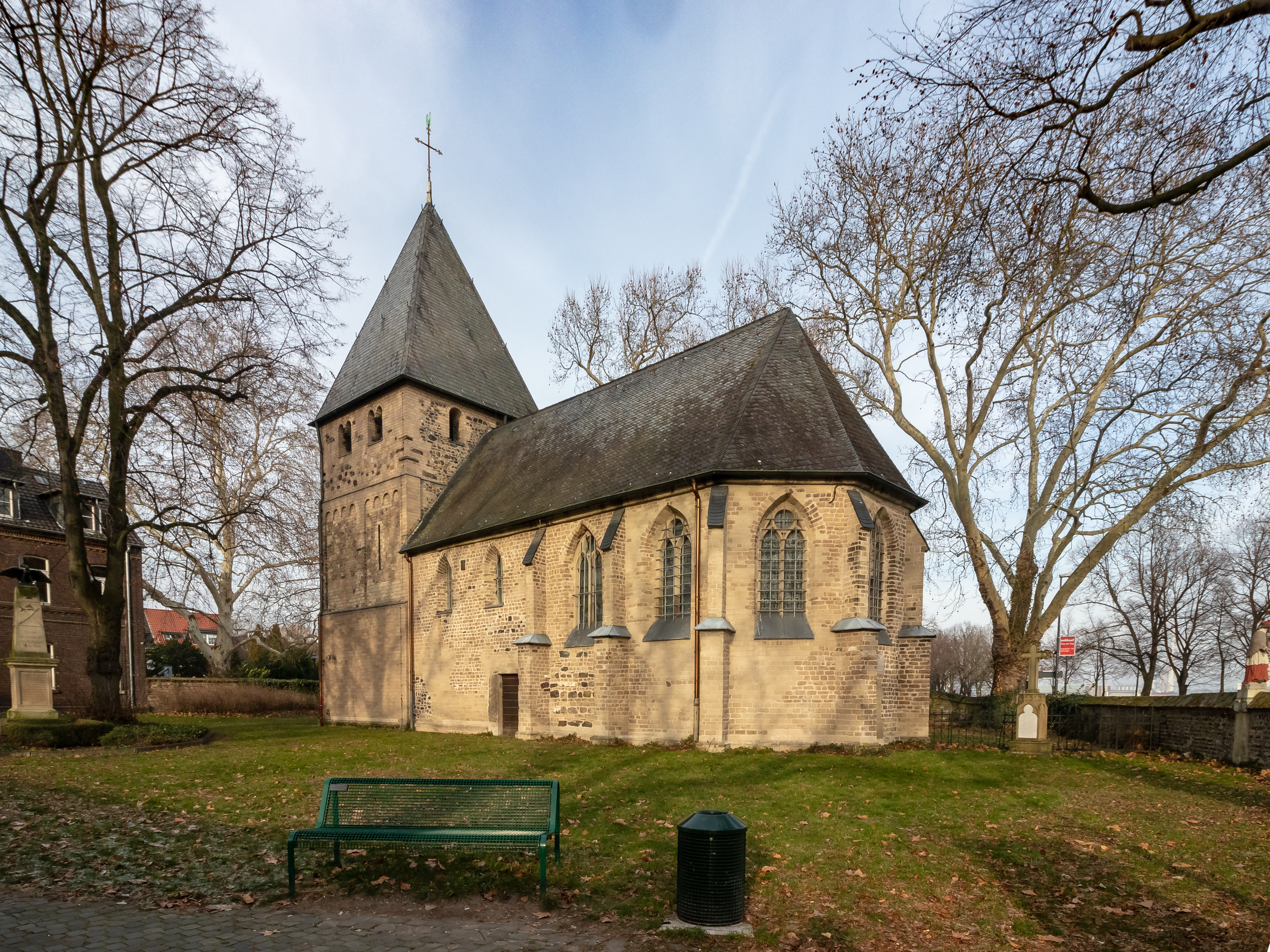 Alt St. Katharina (Köln-Niehl)